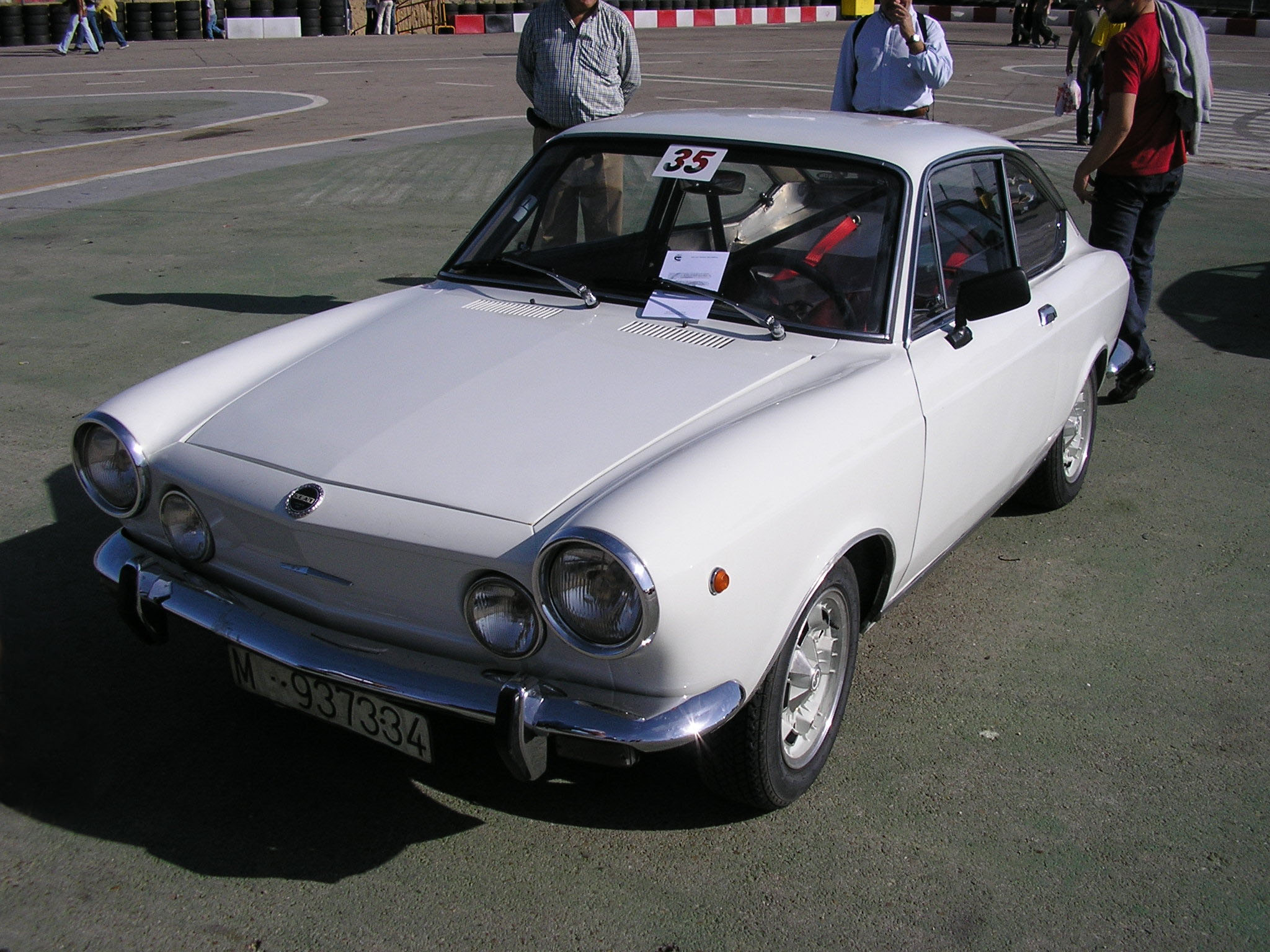 Seat 850 Sport shown in Circuito del Jarama (Madrid). Jornada de puertas abiertas 2006.